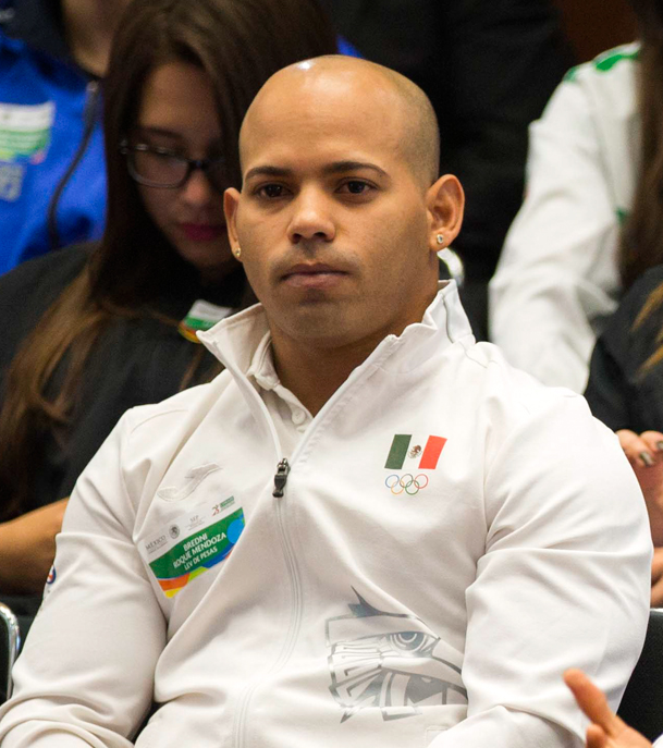 El Presidente Enrique Peña Nieto se reunió hoy con los deportistas que integraron la delegación mexicana que participó en los Juegos Olímpicos de Río de Janeiro 2016, a quienes les expresó su reconocimiento por el esfuerzo, la entrega, el empeño y el coraje que demostraron en esta justa olímpica y durante el proceso para llegar a ella.